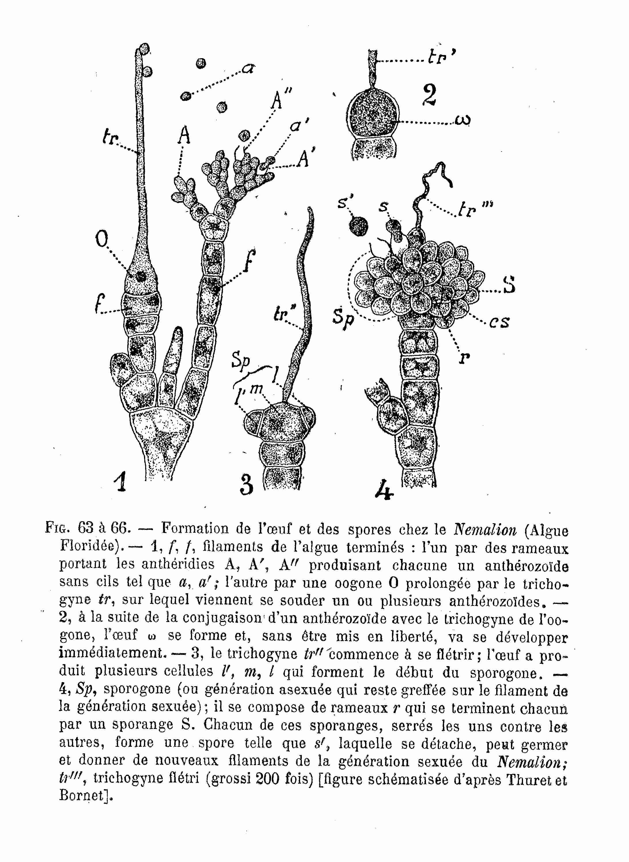 Némalion - formation de l'oeuf & des spores